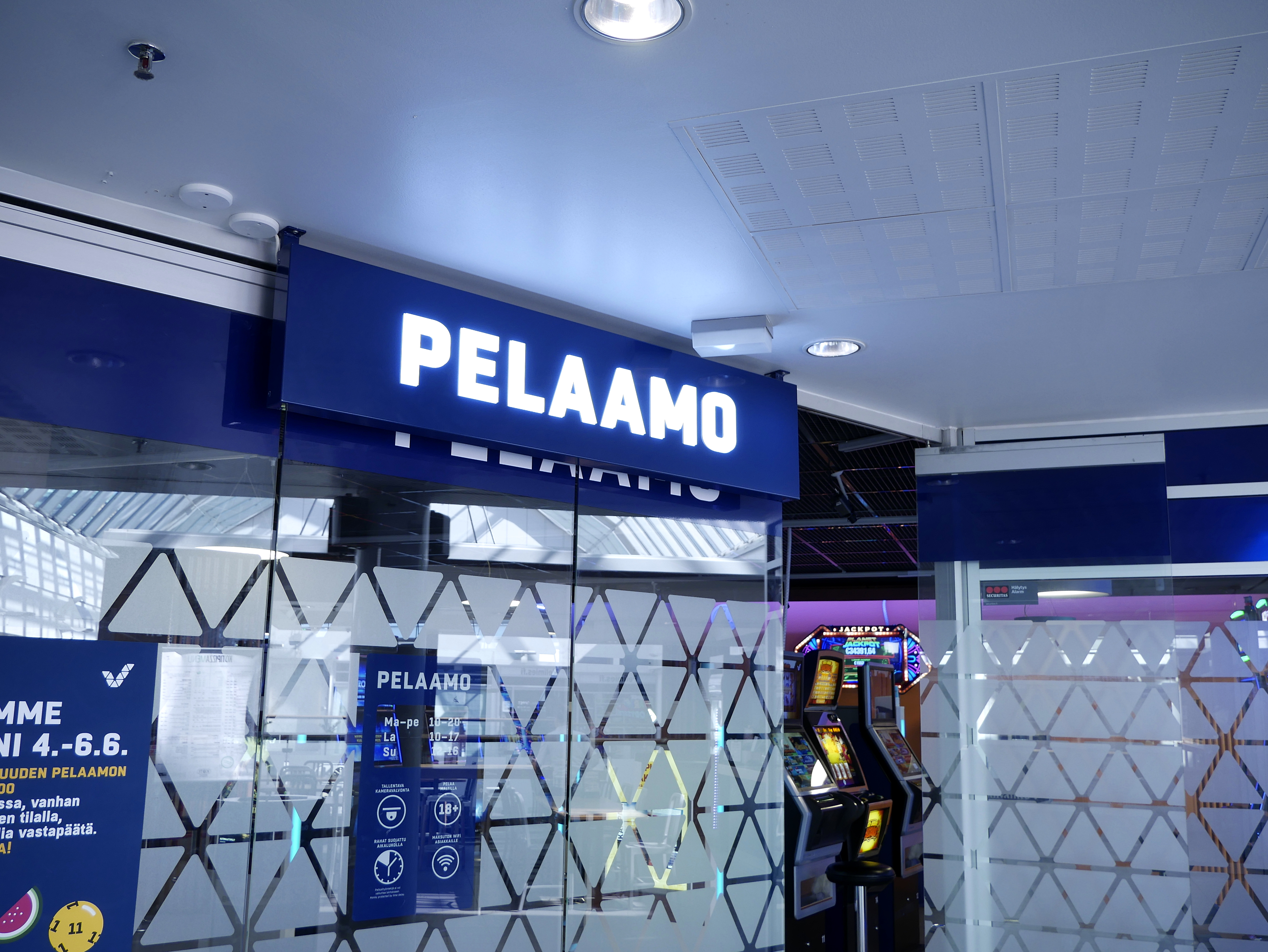 Veikkauksen Pelaamo Vaasan Rewell Centerissä.